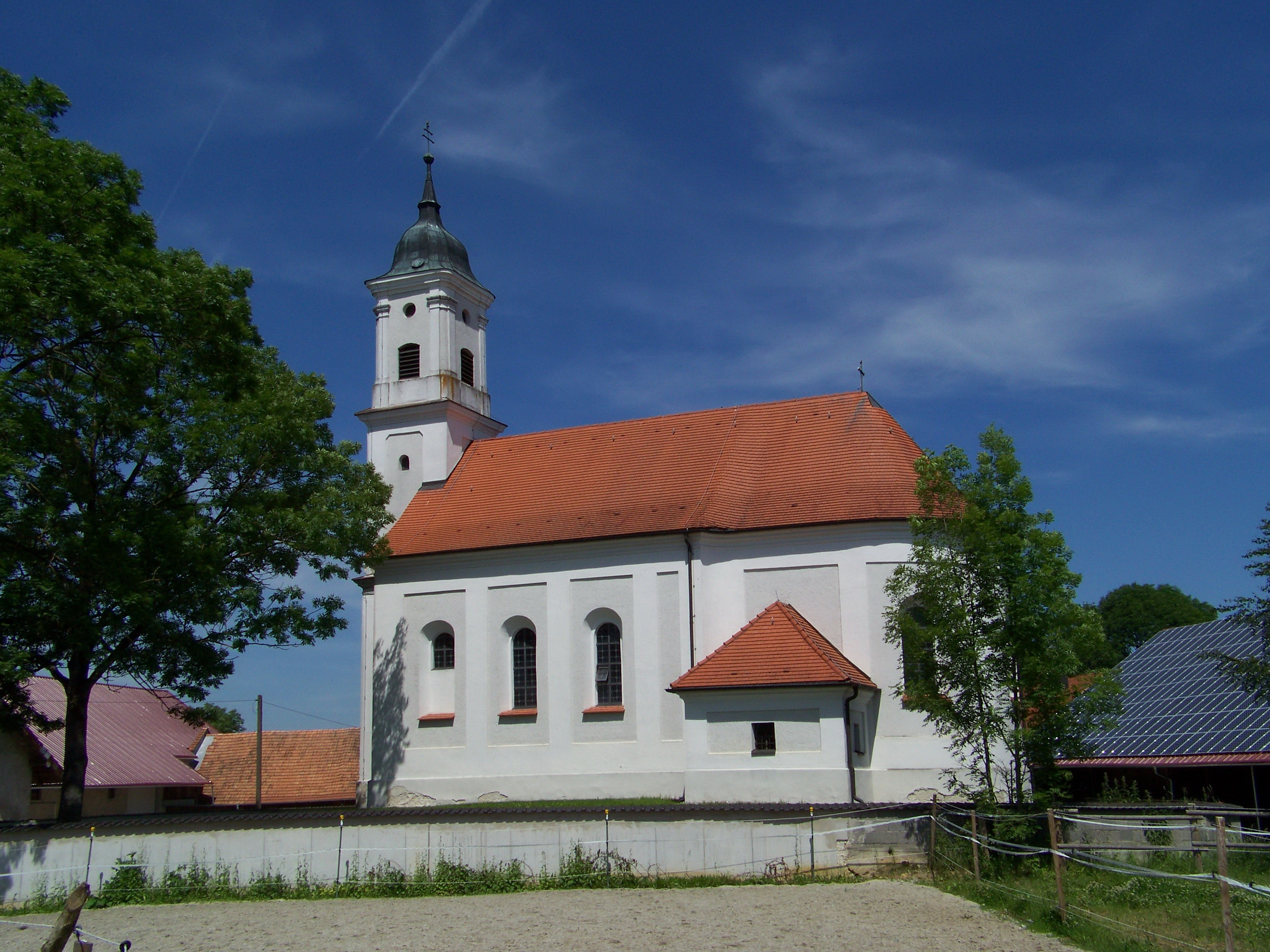 Oberschneiding, Niederschneiding 13. Katholische Filialkirche St. Petrus, einheitlicher kleiner Bau um 1720; mit Ausstattung.